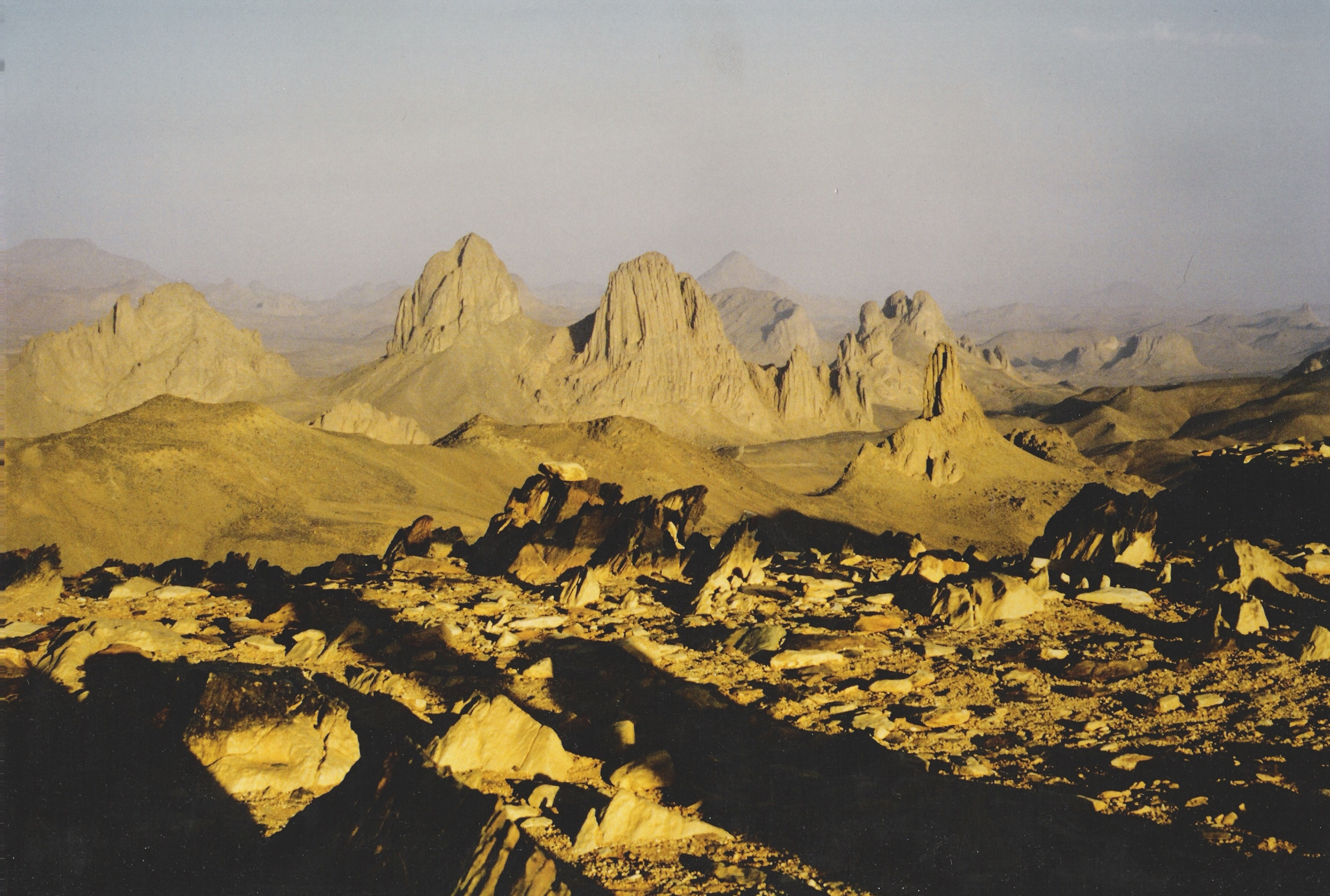 Assekrem-Plateau, Hoggar, Ahaggar, Algerien.